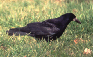 Corvus frugilegus